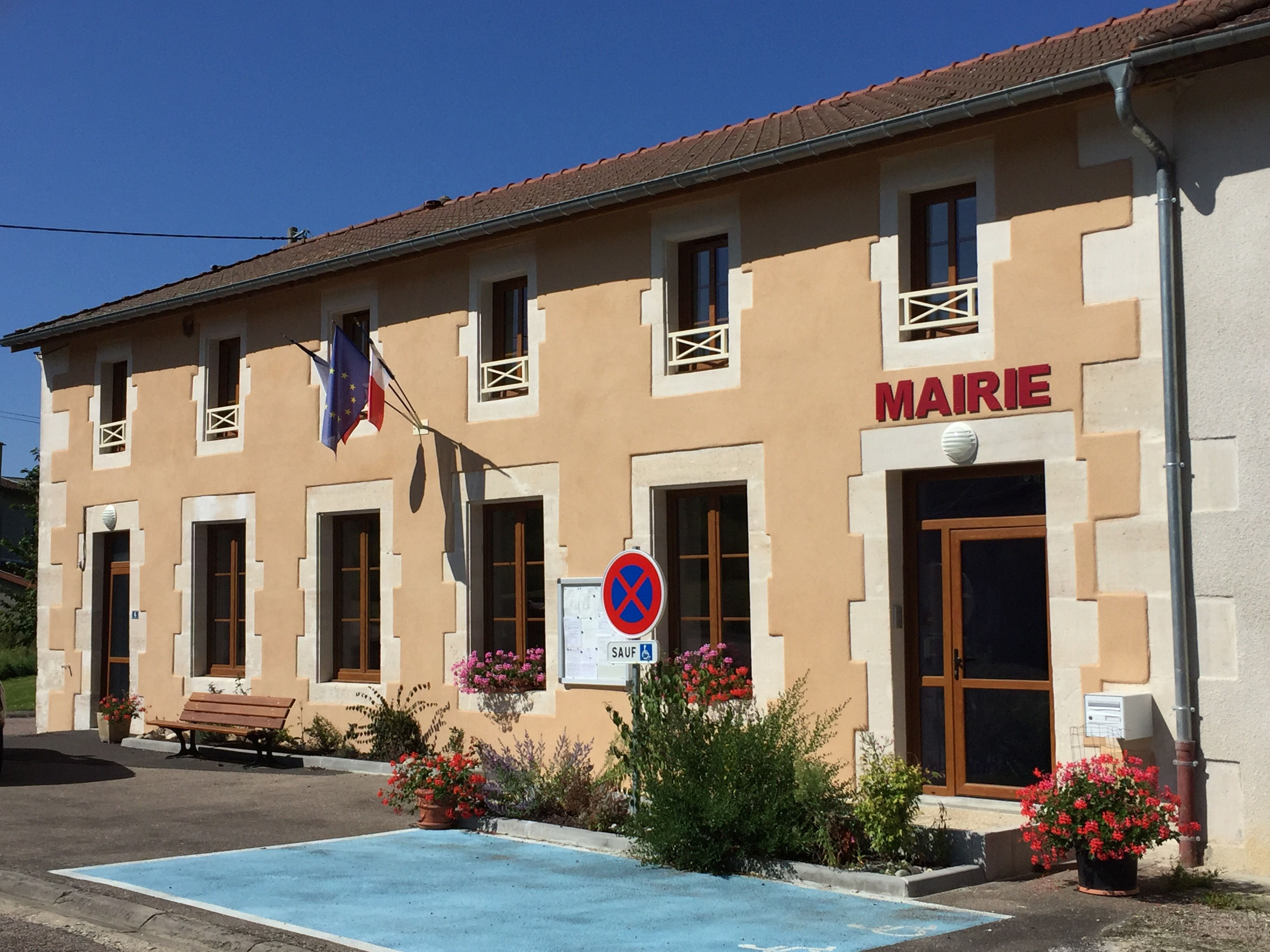 Mairie de Sailly